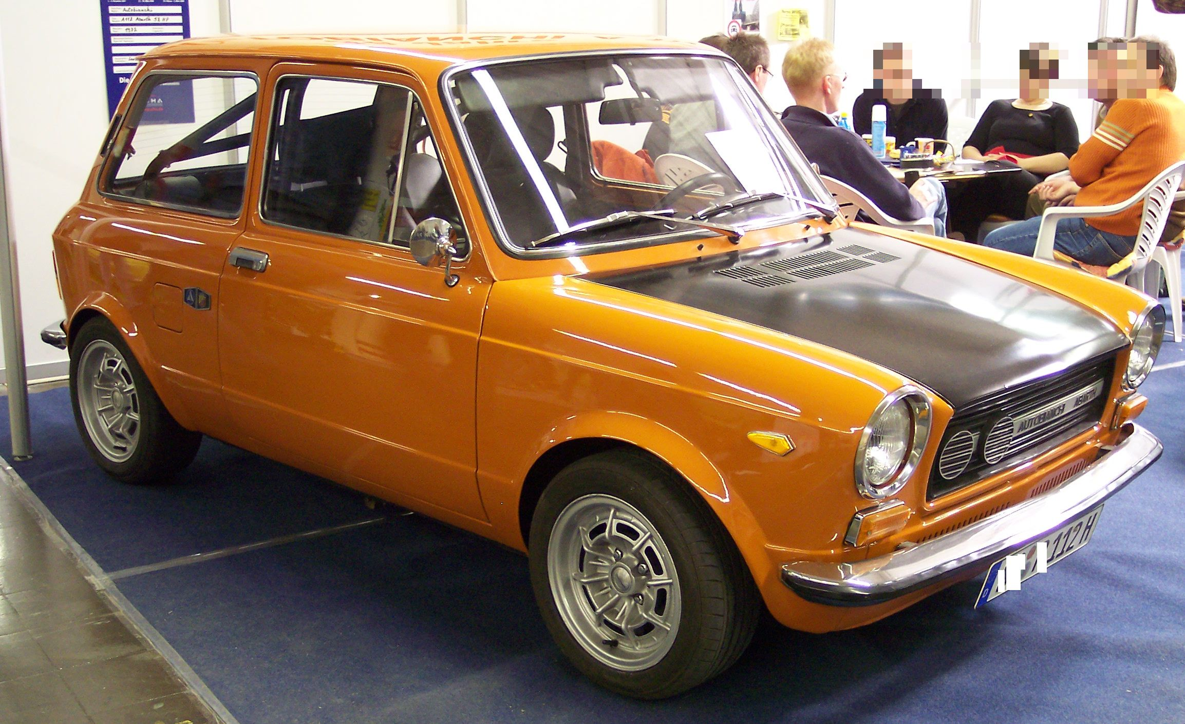 Autobianchi A112 Abarth 1ª serie del 1972